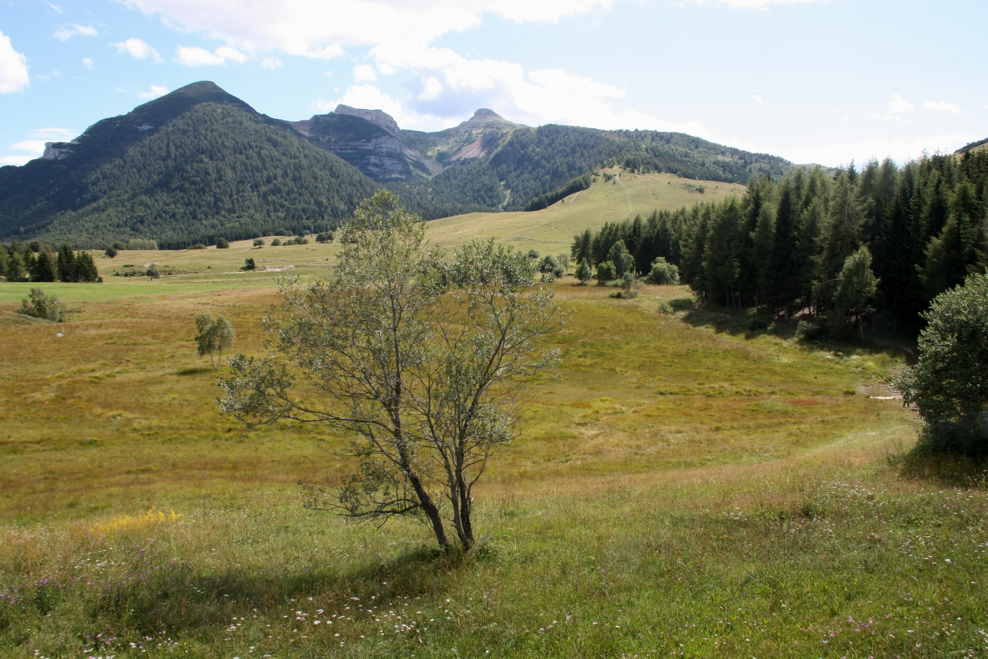 Monte Bondone This is a photo of a monument which is part of cultural heritage of Italy.